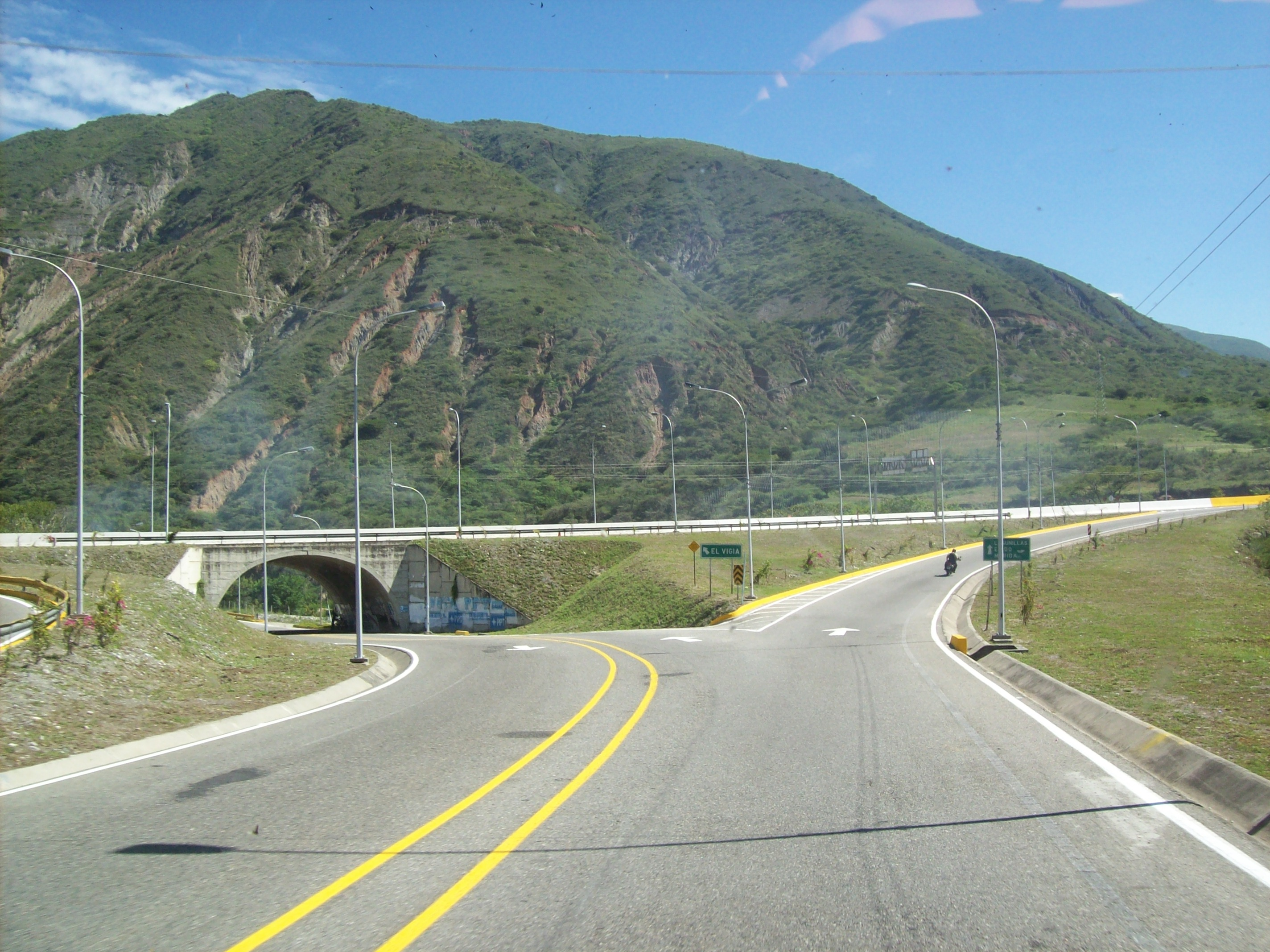 Distribuidor de estanques, Autopista Rafale Caldera, entrada al sistema de tuneles.